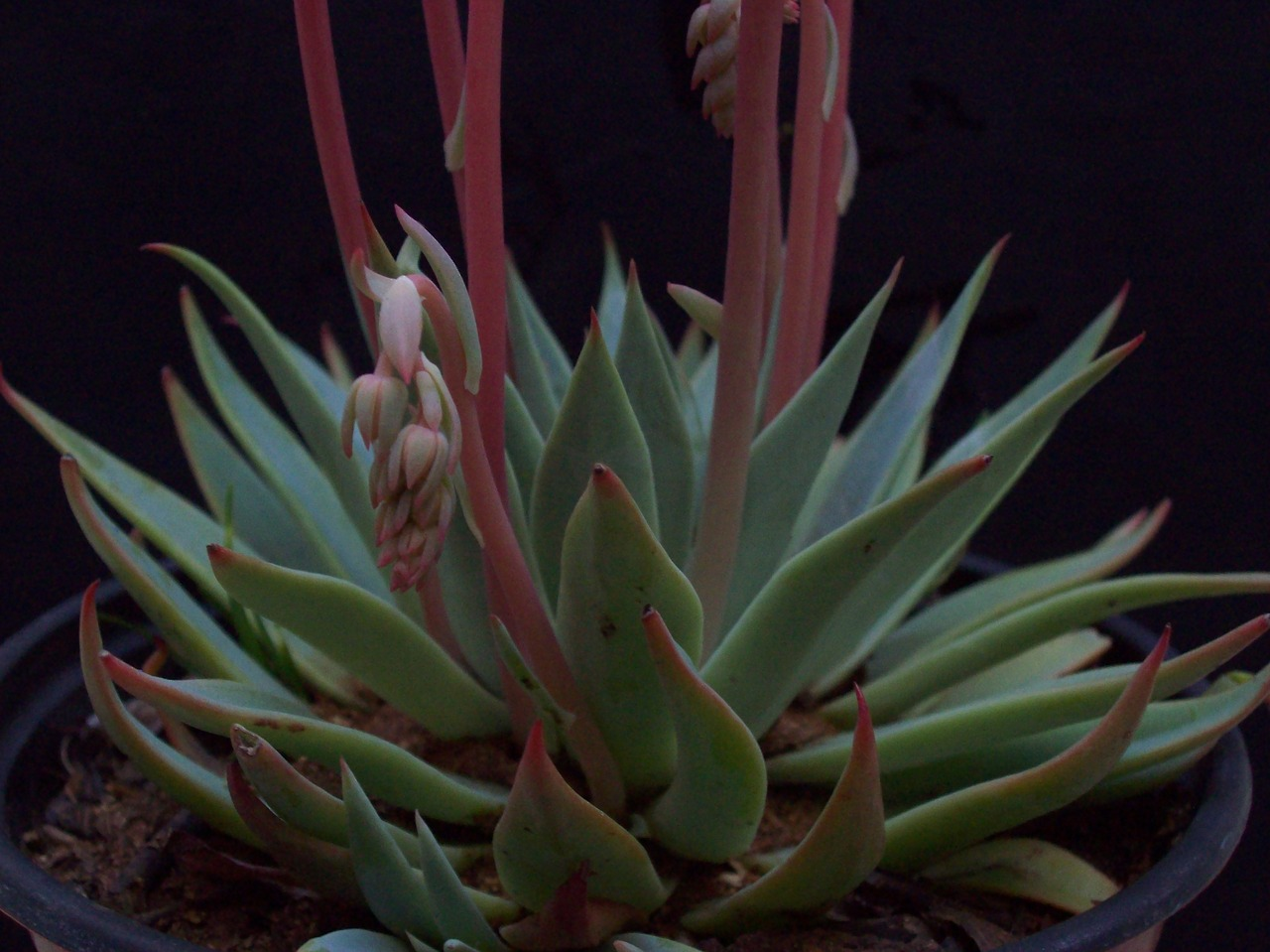 Roseta 2